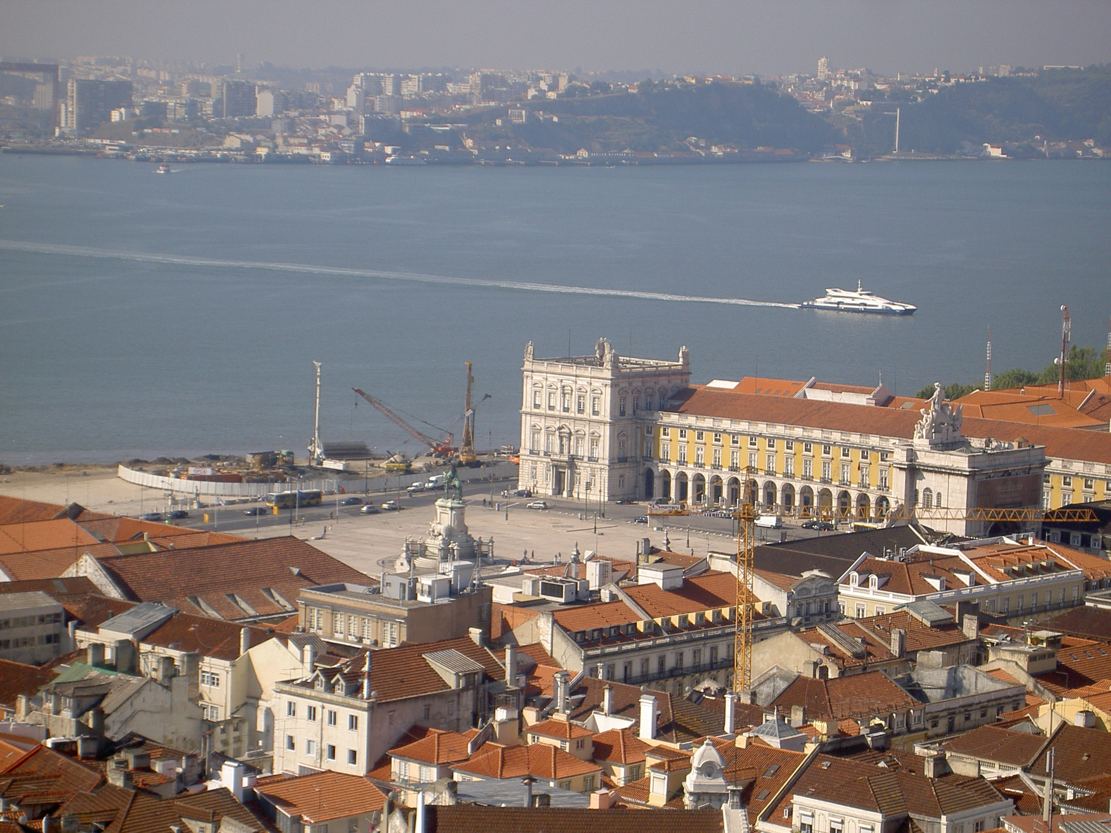 Praça do Comércio seen from St. George's Castle